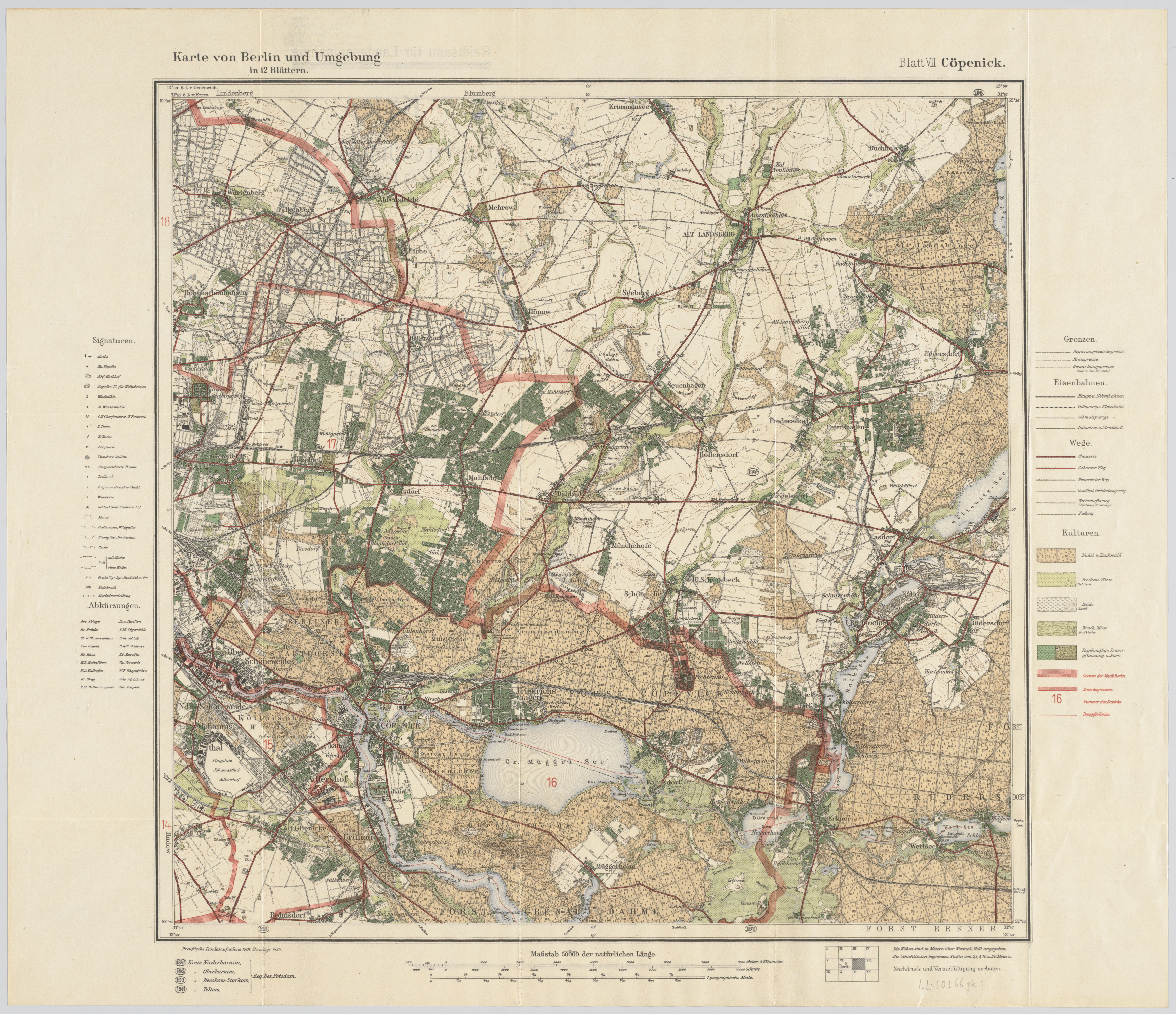 Die aus 12 Blättern bestehende Kartenserie ging 1901 aus der "Karte der Umgegend von Berlin" hervor und erschien bis 1920 mindestens fünfmal. Der Titel steht auf allen Blättern 2-zeilig links oben über dem Plan. Seit der Ausgabe von 1913 sind im Rahmen sowohl die Längen von Ferro wie auch von Greenwich angegeben. Links unter dem Plan steht: "Preußische Landesaufnahme 1901. Berichtigt 1920"; drei Maßstabsleisten über 8.000 Meter, 10.000 Schritt und 1 geographische Meile; rechts daneben ein Übersichtsschema und ein Hinweis zum Höhenbezug. Rechts und Links neben dem Plan ist auf jedem Blatt eine ausführliche Legende abgedruckt. Die "Grenze der Stadt Berlin" wurde hier gem. des Groß-Berlin-Gesetzes von 1920 mit aufgenommen.